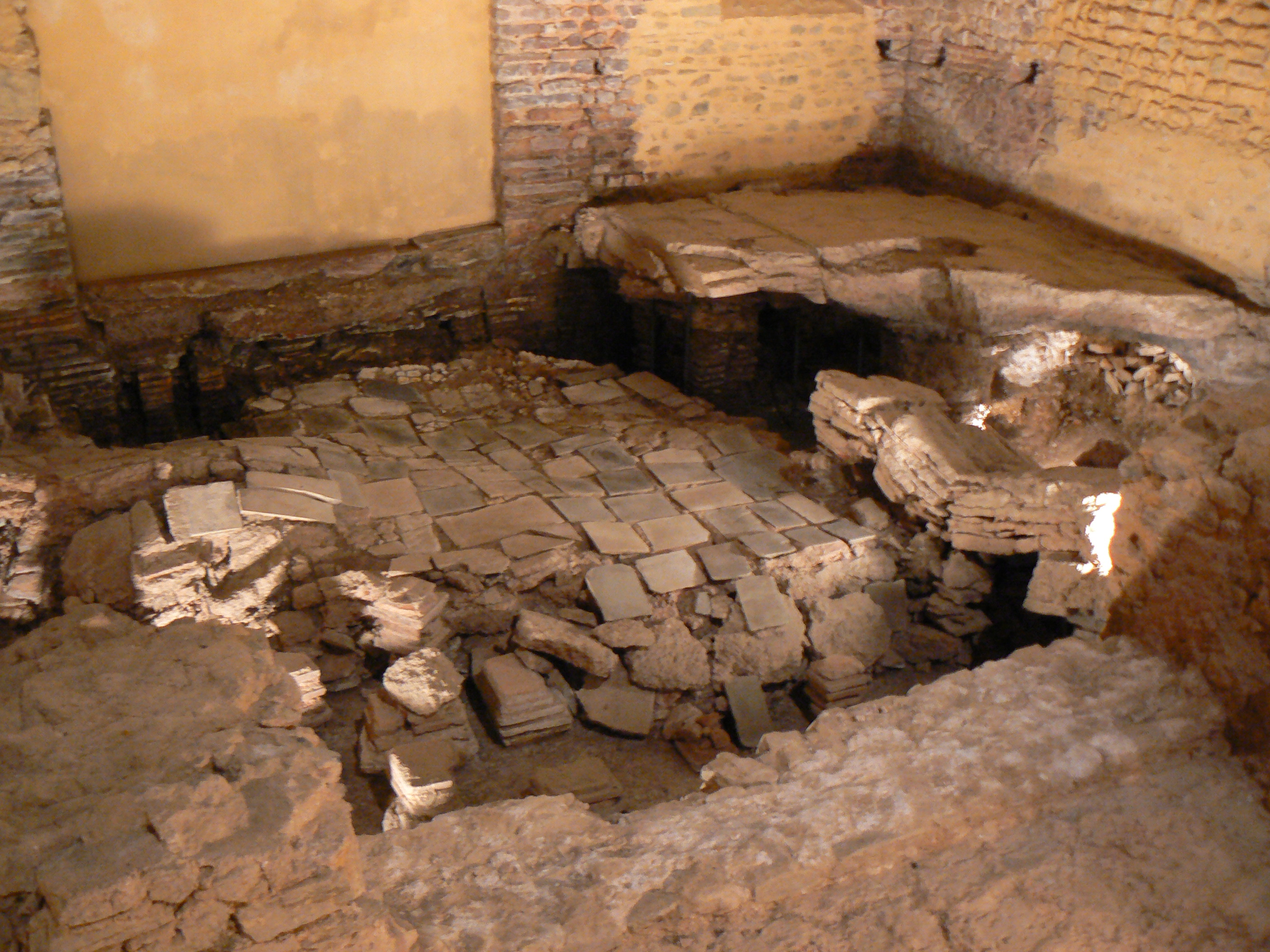 Salle chaude des thermes d'Entrammes (Mayenne), avec son sol effrondé.